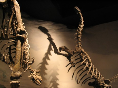 Musée paléontologique Egidio Feruglio, Trelew, Argentine.